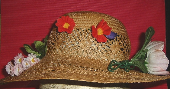 Strohhut aus Maisstroh, Gärtnerart, geschmückt mit Plastikblumen